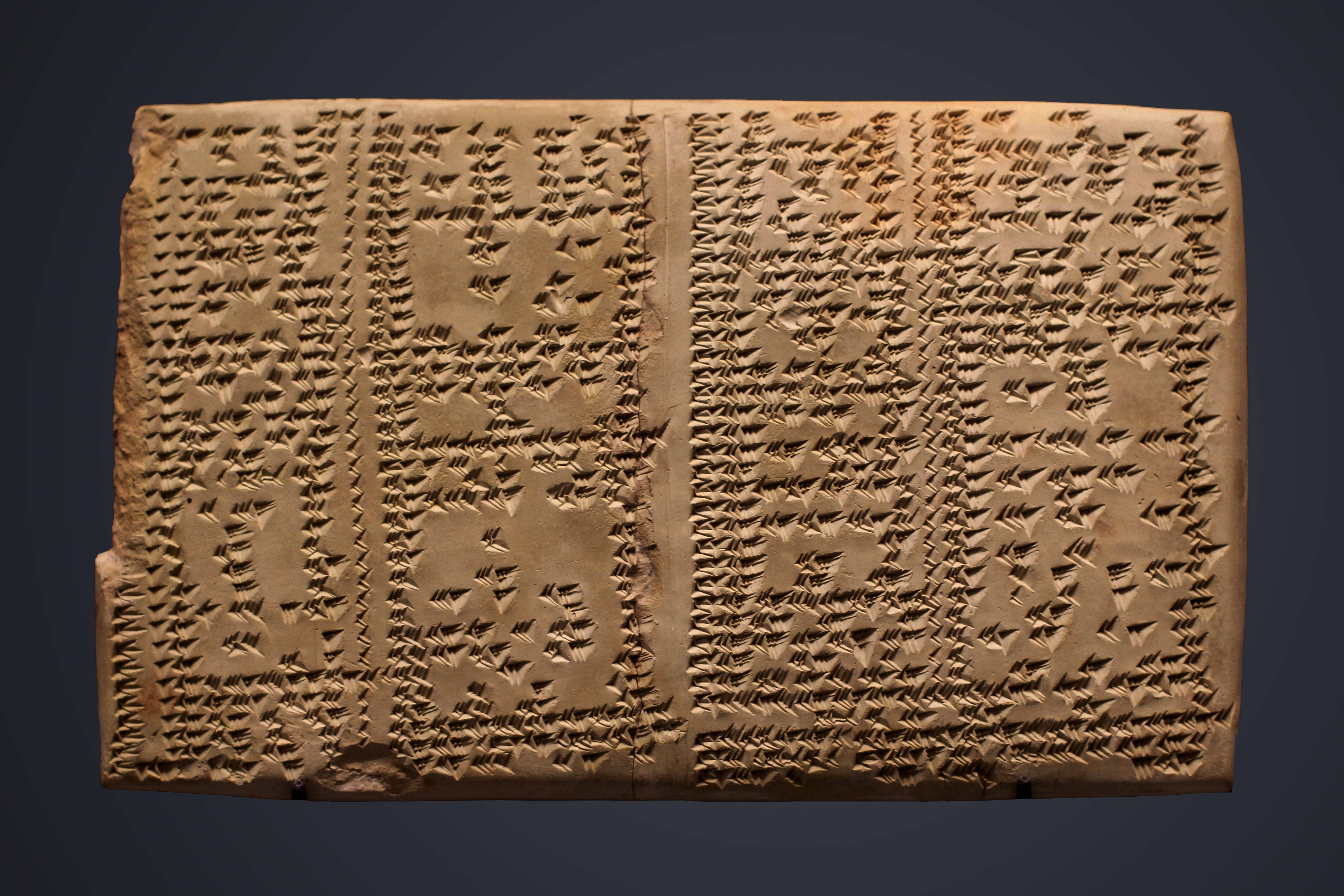 Terre cuite Époque séleucide (fin du 1er millénaire av. J.-C.), copie d'un original plus ancien Warka, ancienne Uruk, Basse Mésopotamie (Iraq). Table de valeurs réciproques. Division de l'unité par une série de nombres compris entre 1 et 3. Les babyloniens conservèrent le système sextagésimal sumérien pour les textes scientifiques. Il nous est resté de ce mode de calcul la division du cercle en 360°, la mesure des angles en degrés et celle du temps en heures de 60 minutes. Pour les opérations comptables de la vie courante, on utilisait le système décimal. À l'époque séleucide, on introduisit le 0 [zéro], une innovation s'inspirant d'un procédé babylonien isolé. Acquisition, 1918.